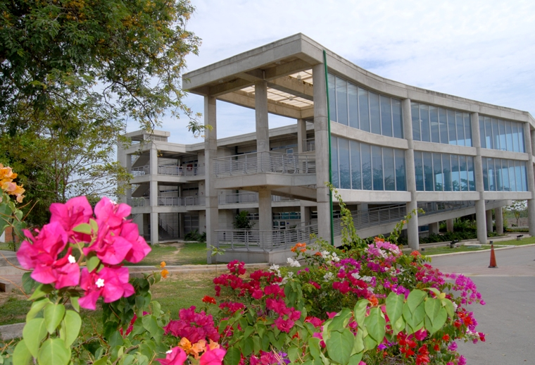 Fachada del edificio de diseño industrial ubicado en las instalaciones de la Universidad del Norte en Barranquilla Colombia.